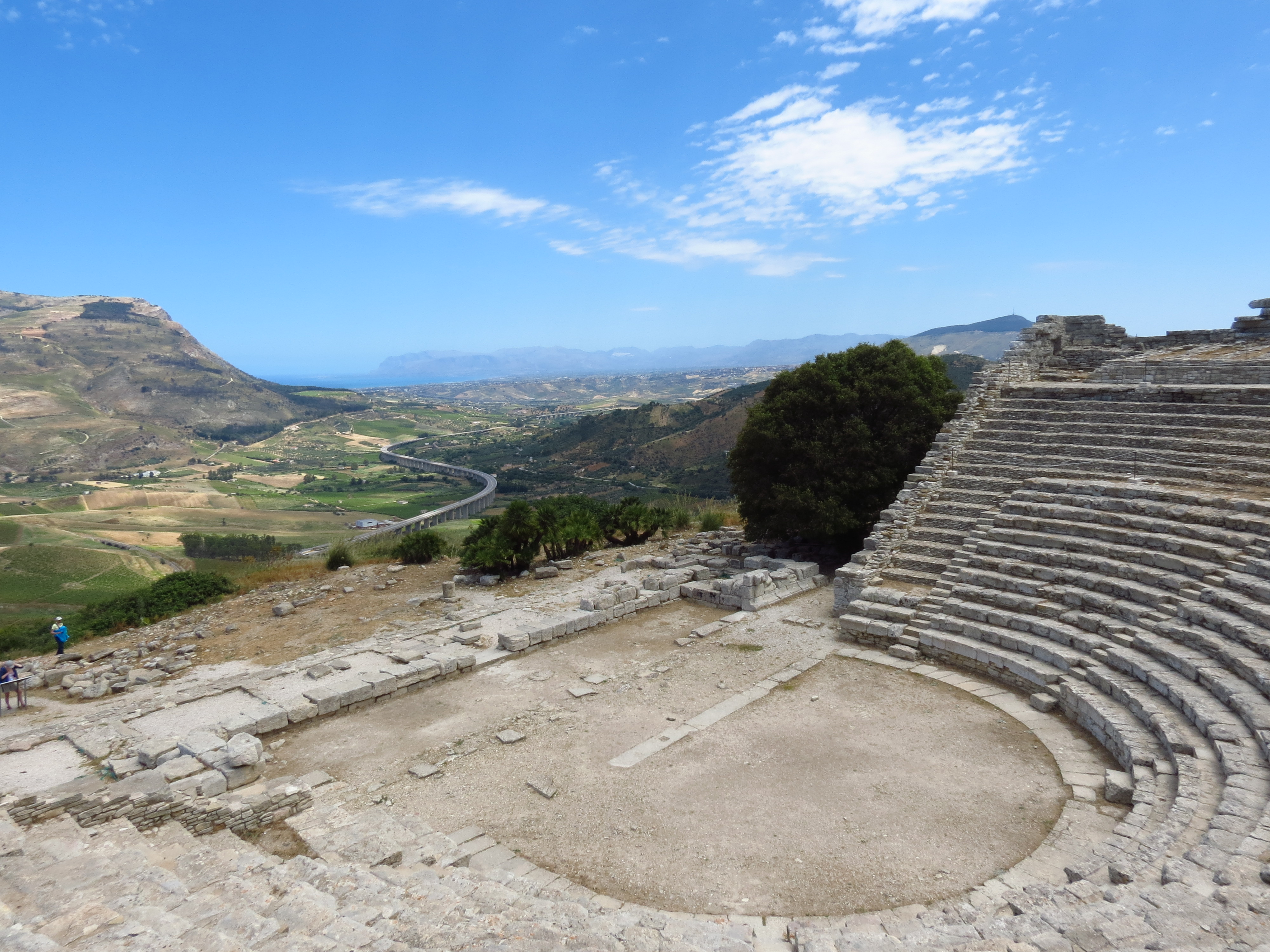 Vue de la Sicile.